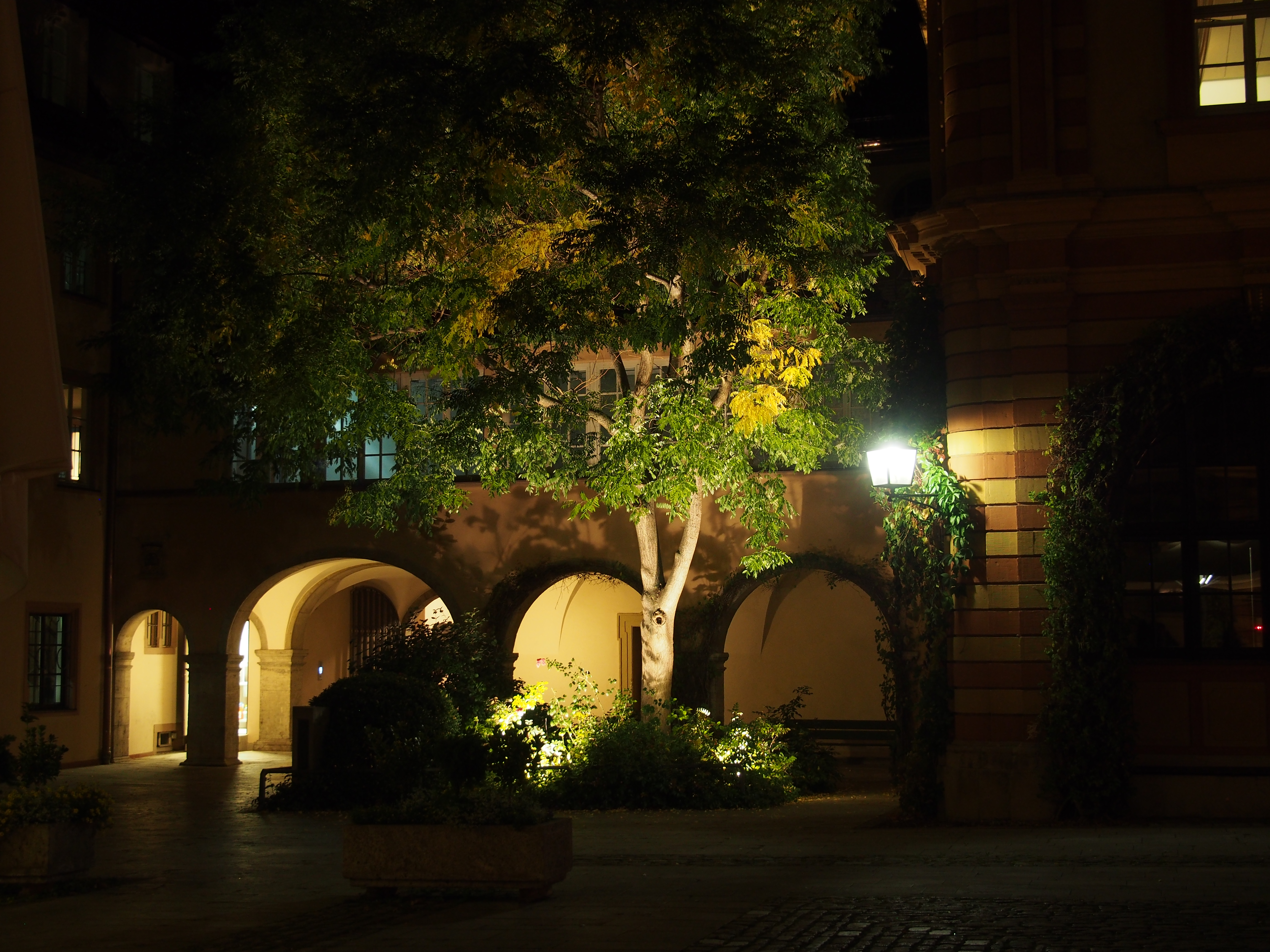 Innenhofarkaden des "Bürgerspitals zum Heiligen Geist" (Würzburg)